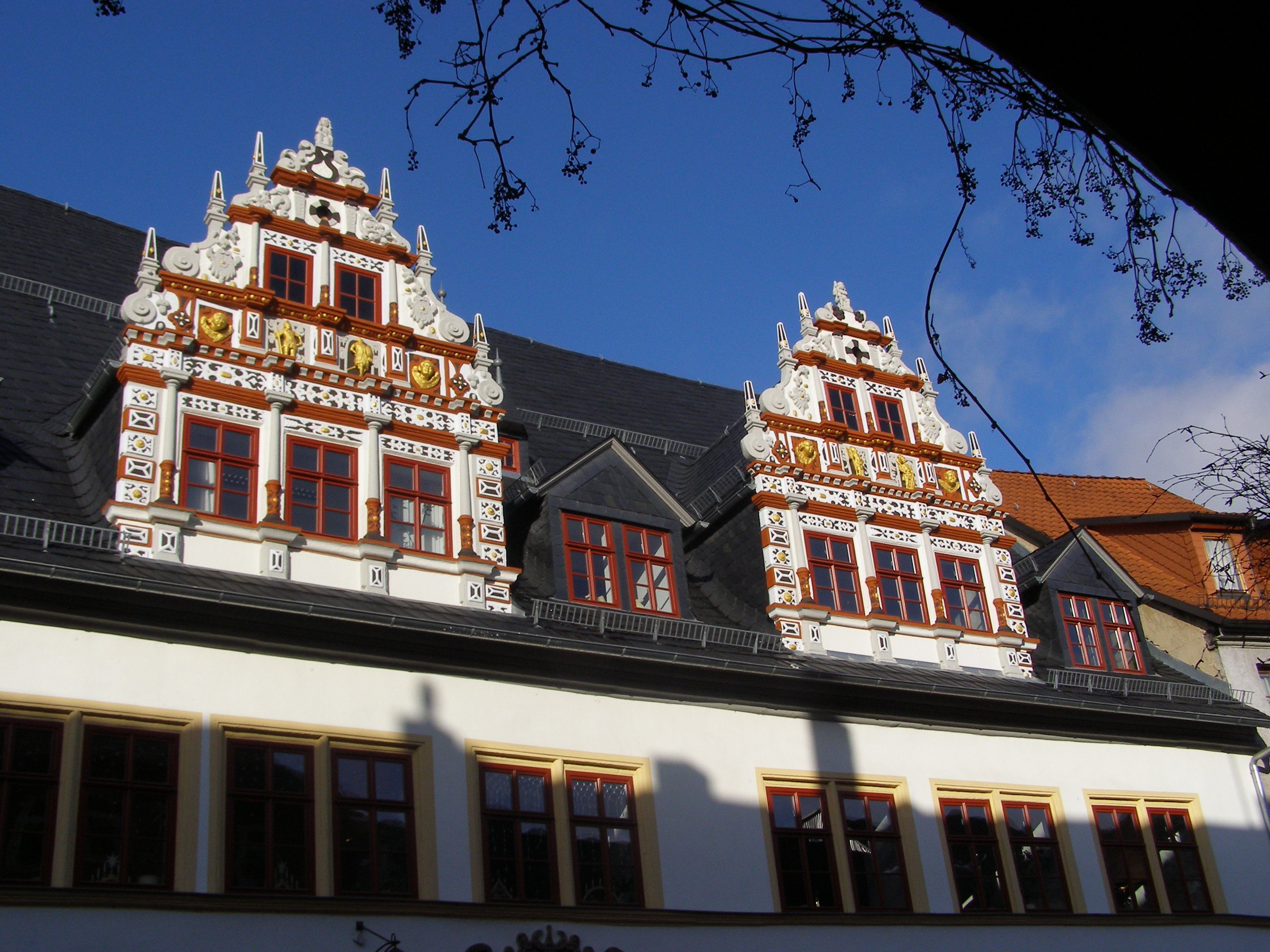 Saalstrasse 11 - Patrizierhaus